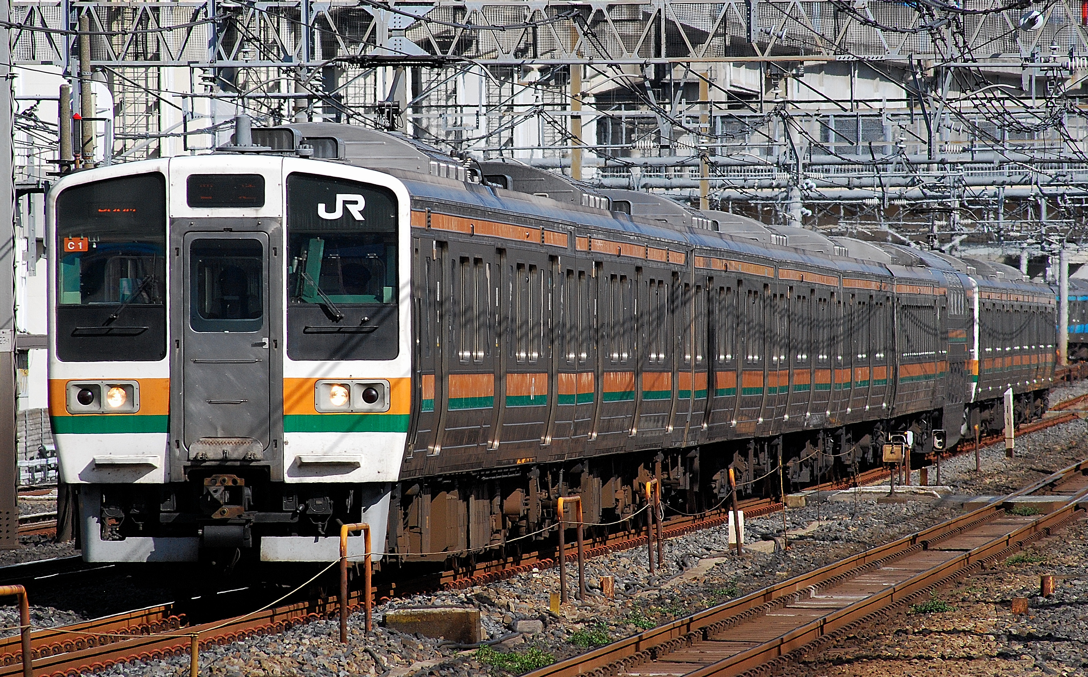 JR東日本高崎車両センター所属の211系3000番台C1編成（公道から撮影）。